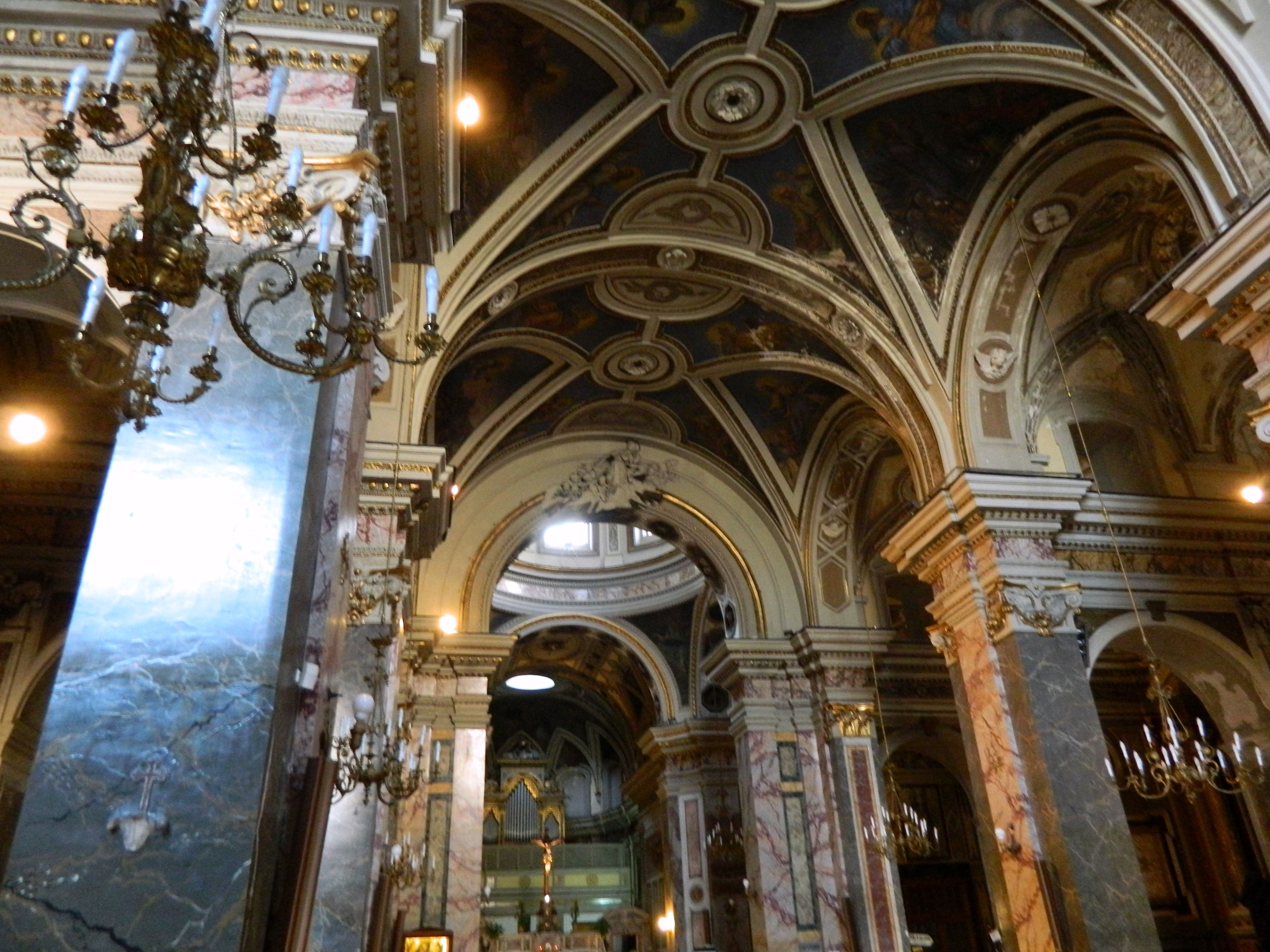 Chiesa di San Domenico Soriano (Napoli) - Interno